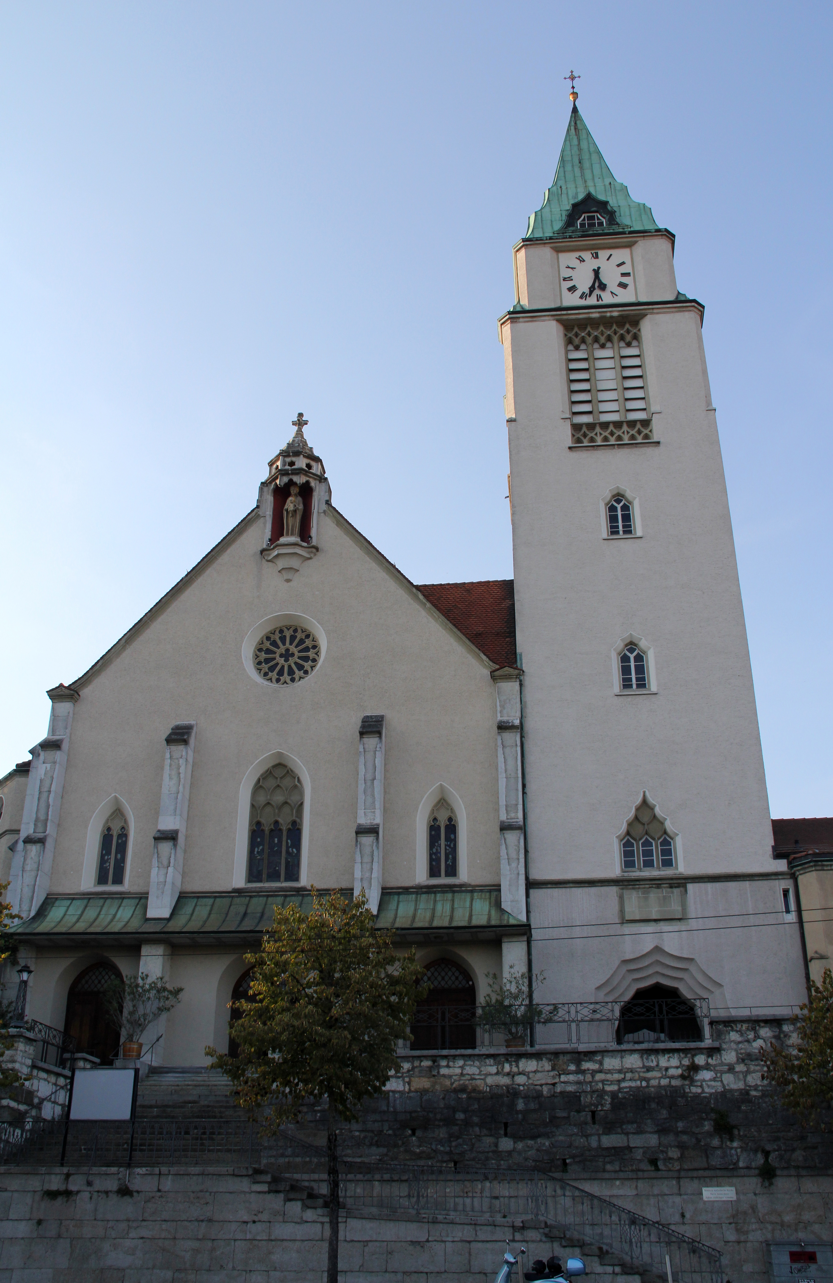 Katholische Pfarrkirche St. Maria Immaculata in Biel